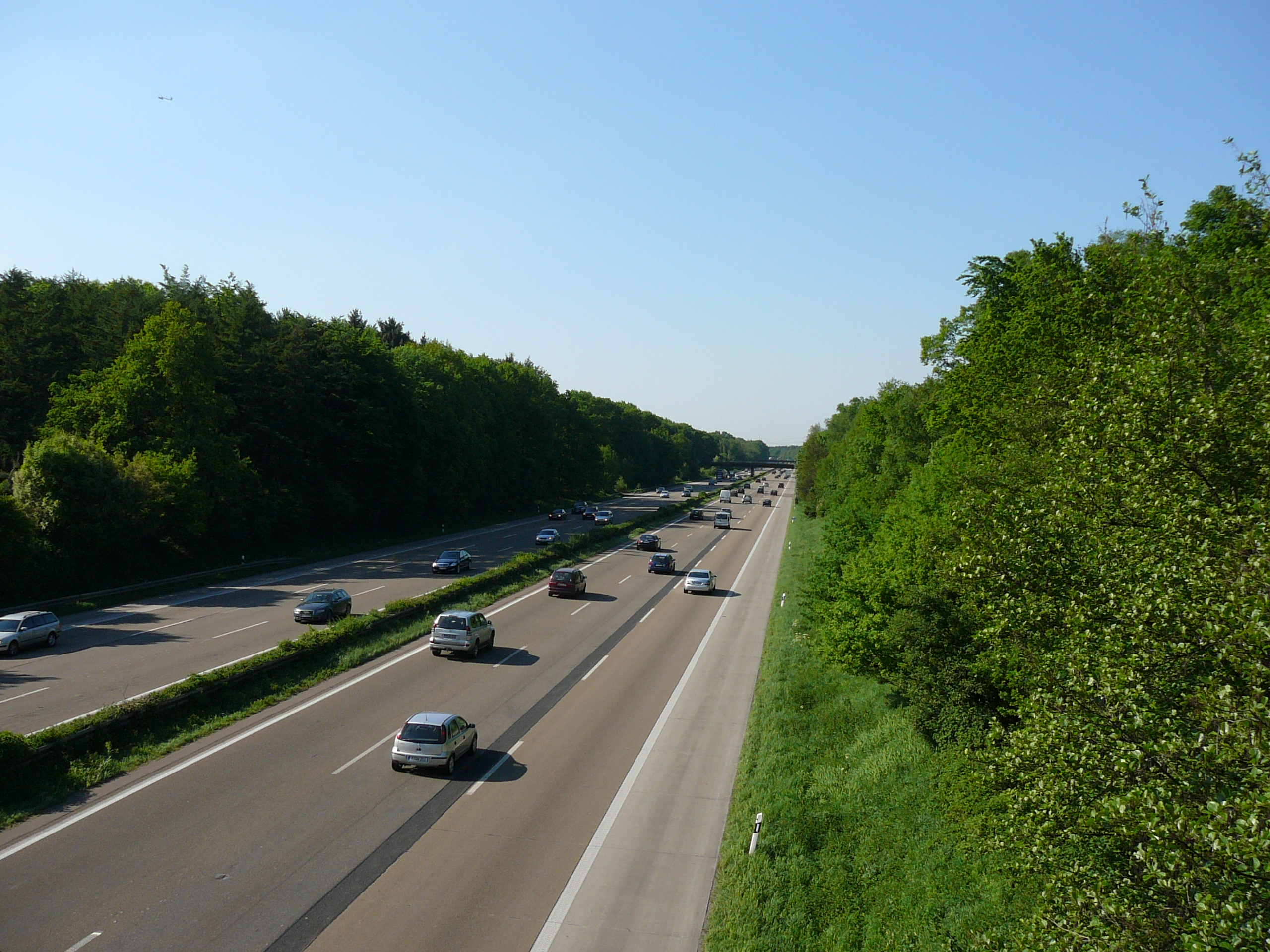 Schwanenmühle und Motte Schwanenmühle, Langenfeld (Rheinland)